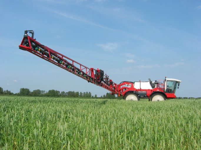 Agrifac Condor, selbstfahrende Pflanzenschutzspritze